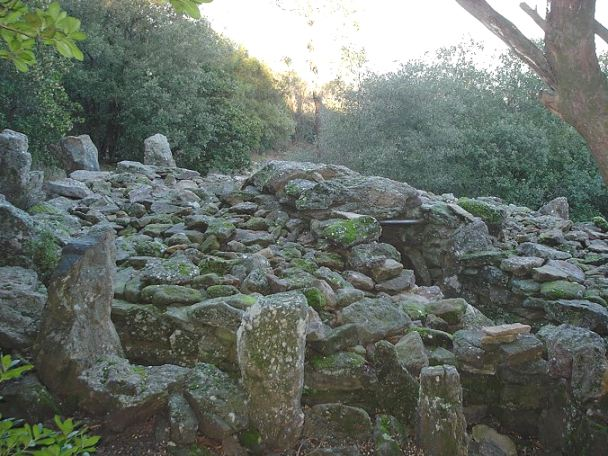 Description: Tumulus du Dolmen de la Bergerie de Panissière (France, Gard)Source: Hugo SoriaLicence: GFDL Hugo Soria